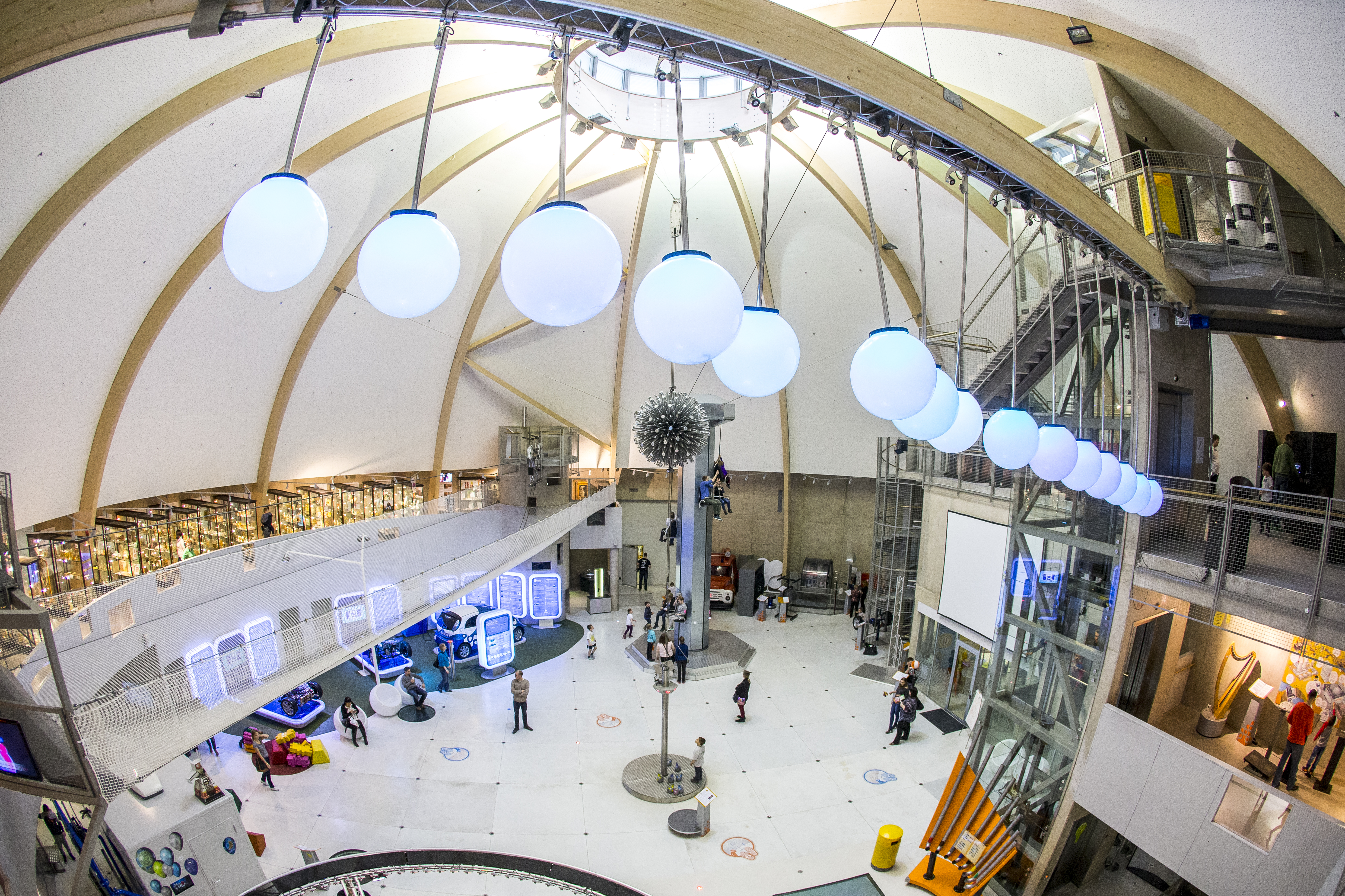 Vaade AHHAA tehnoloogiasaalile 3. korruse rõdult